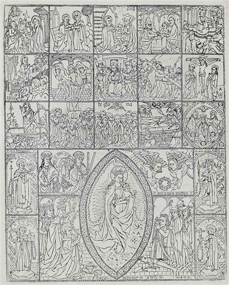 La Virgen del Rosario, grabado calcográfico, 410 x 300 mm